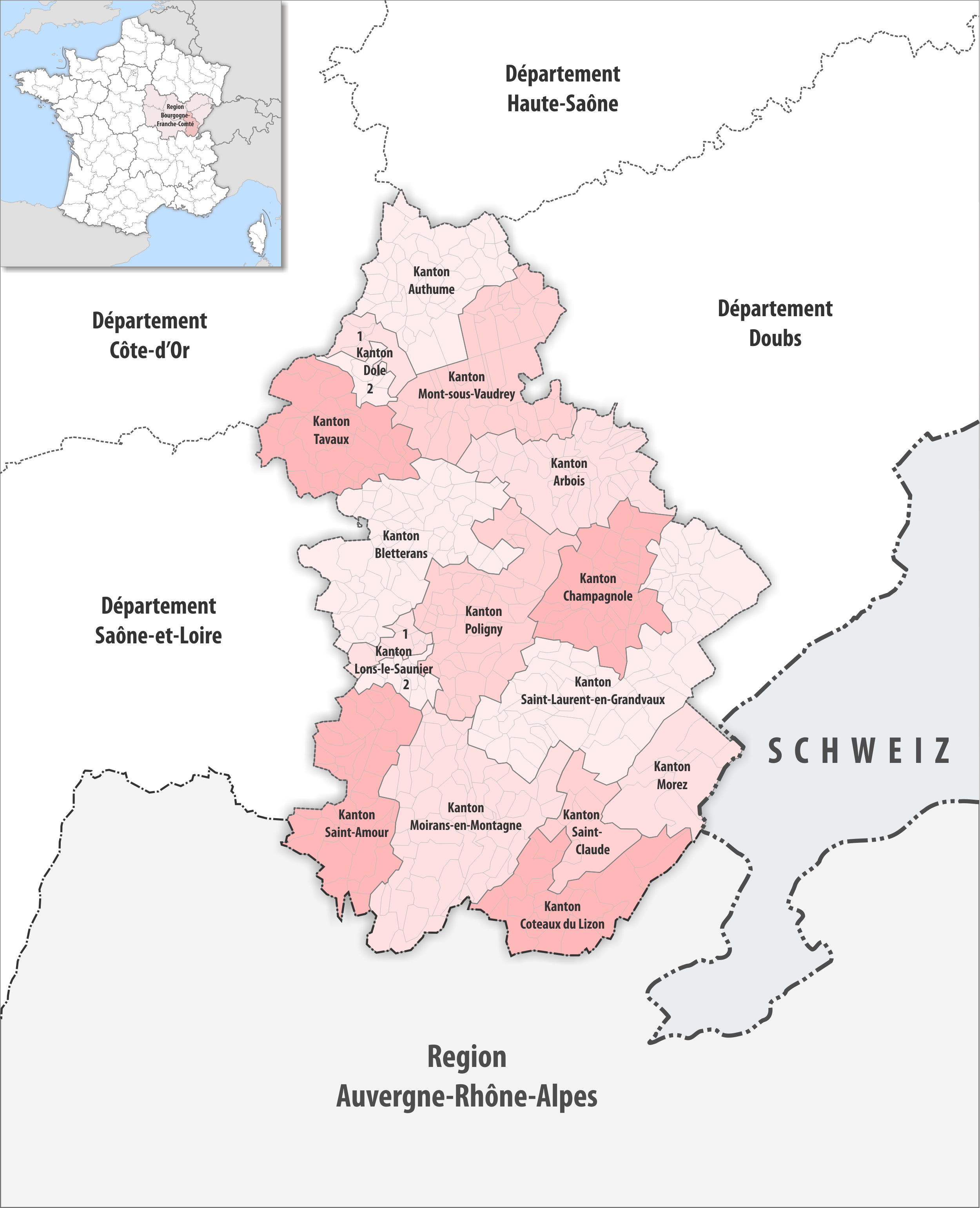 Gemeinden und Kantone im Departement Jura